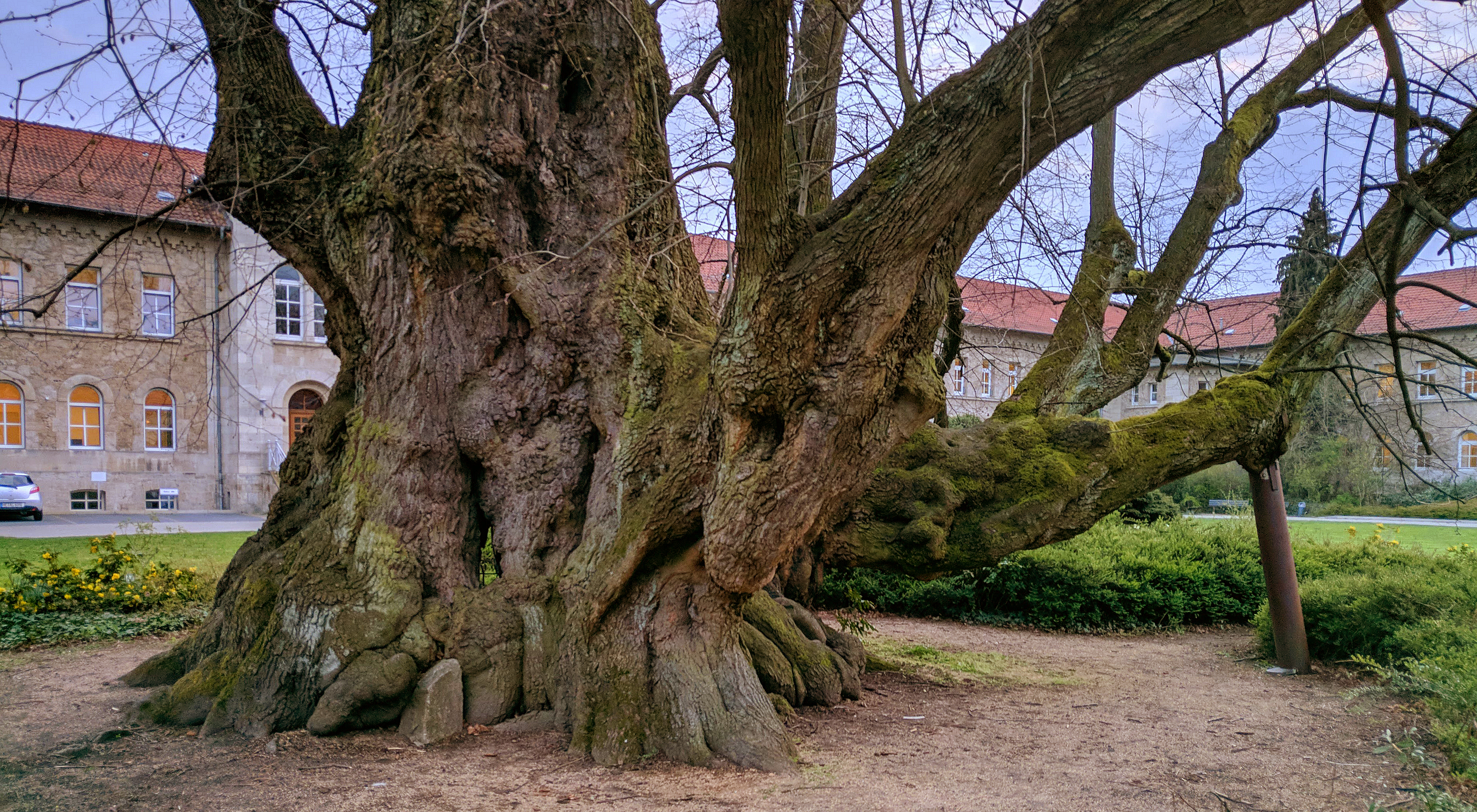 Angeblich wurde die Kaiser-Lothar-Linde 1135 beim Baubeginn des Doms an einer Richtstätte gepflanzt. Heute befindet das Naturdenkmal sich frei zugänglich auf dem Gelände des AWO-Psychiatriezentrums, das im Hintergund sichtbar ist. Rechts sieht man einen Ast, dessen Statik vom Baumpfleger (1975?) mit einer kräftigen Metallstütze stabilisiert wurde, die heute vom Baum umwallt wird. Der Stamm ist hohl und mit Metallgitter verschlossen. Im Bild kann man bei genauerem Hinsehen mittig durch den Stamm hindurchblicken. Das Bild wurde am Abend des 13.4.2019 erstellt, also in der laubfreien Zeit. Dadurch ist der Stamm und die etwas bizarre Struktur des Baumes besser erkennbar.